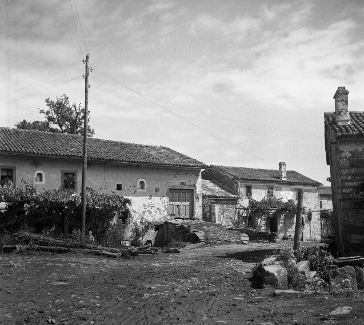 Hiše v Vatovljah.